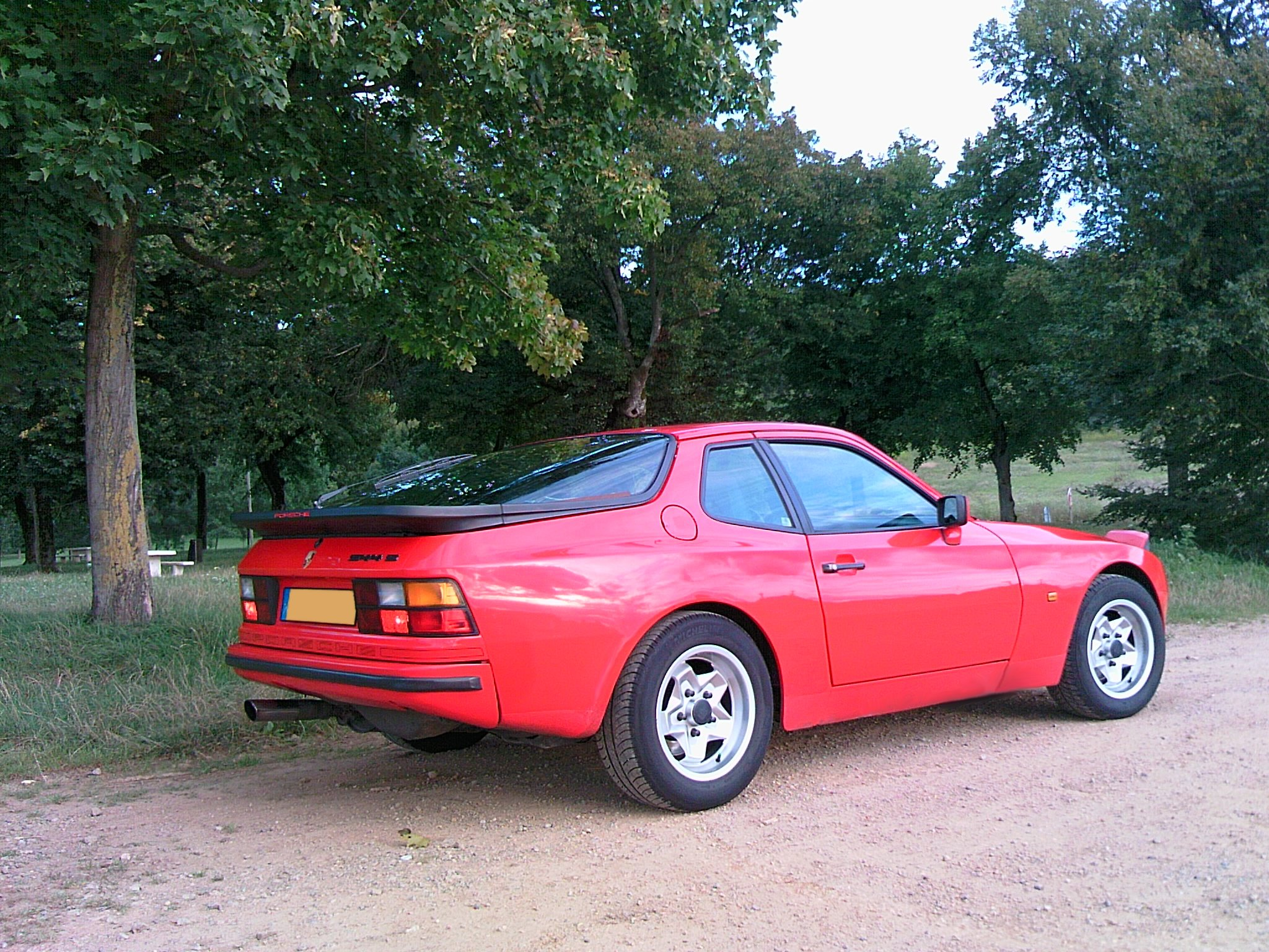 Porsche 944S de côté